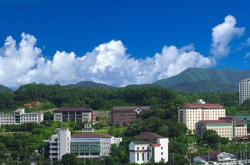 세경대학교 전경